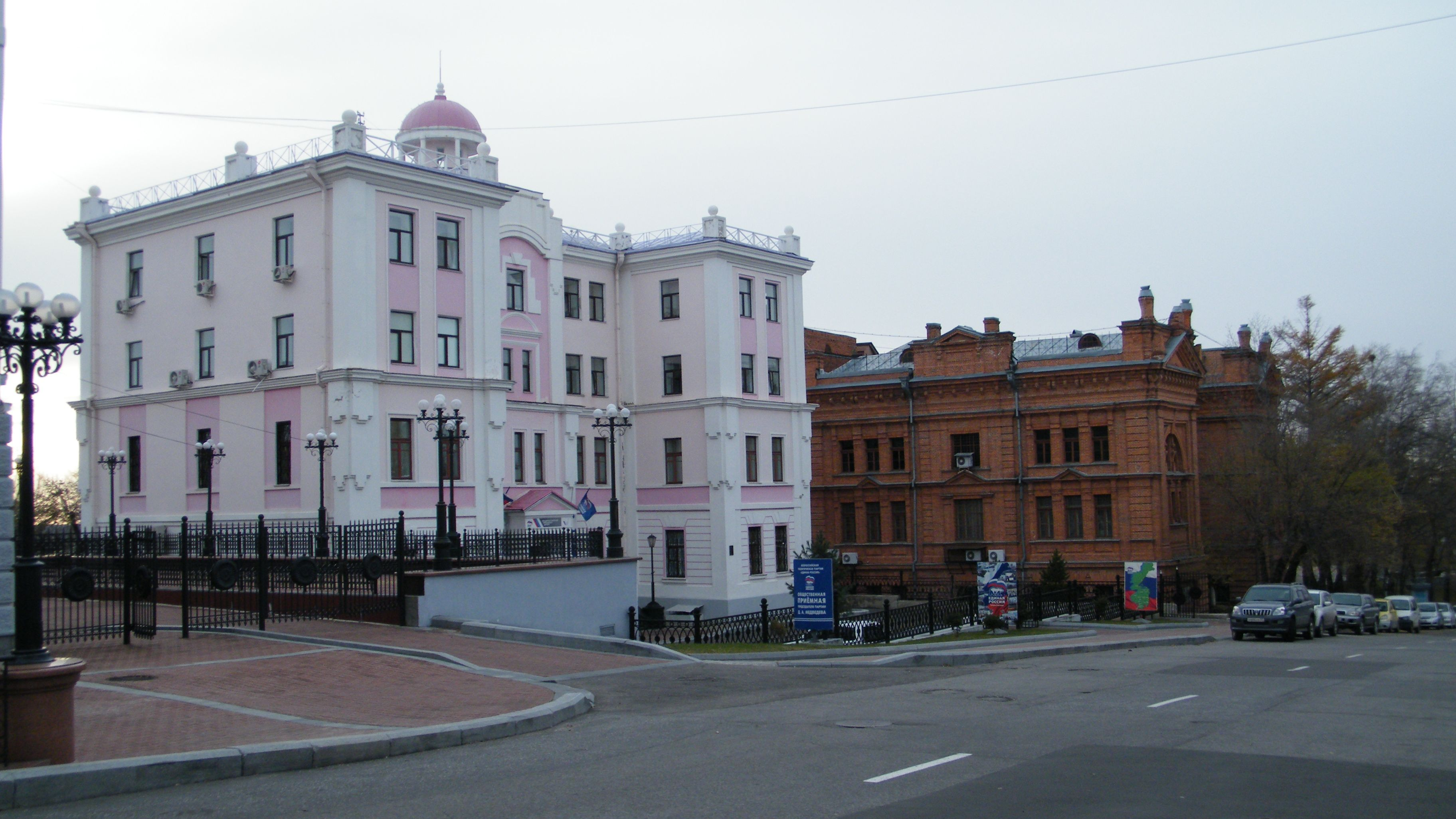 Слева - здание библиотеки Приамурского географического общества, справа - старый корпус Хабаровского краевого музея им. Н. И. Гродекова